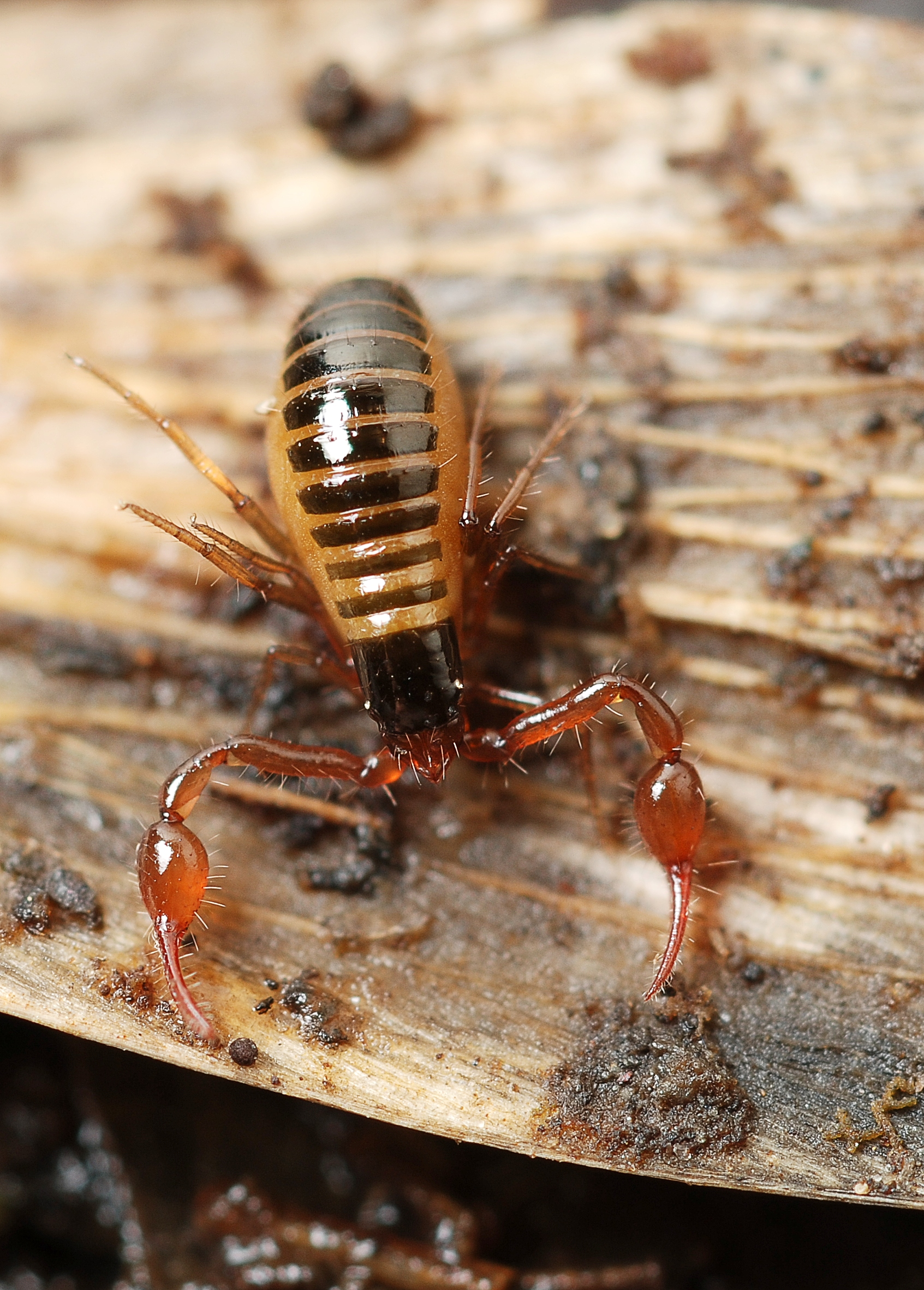 Neobisium sp